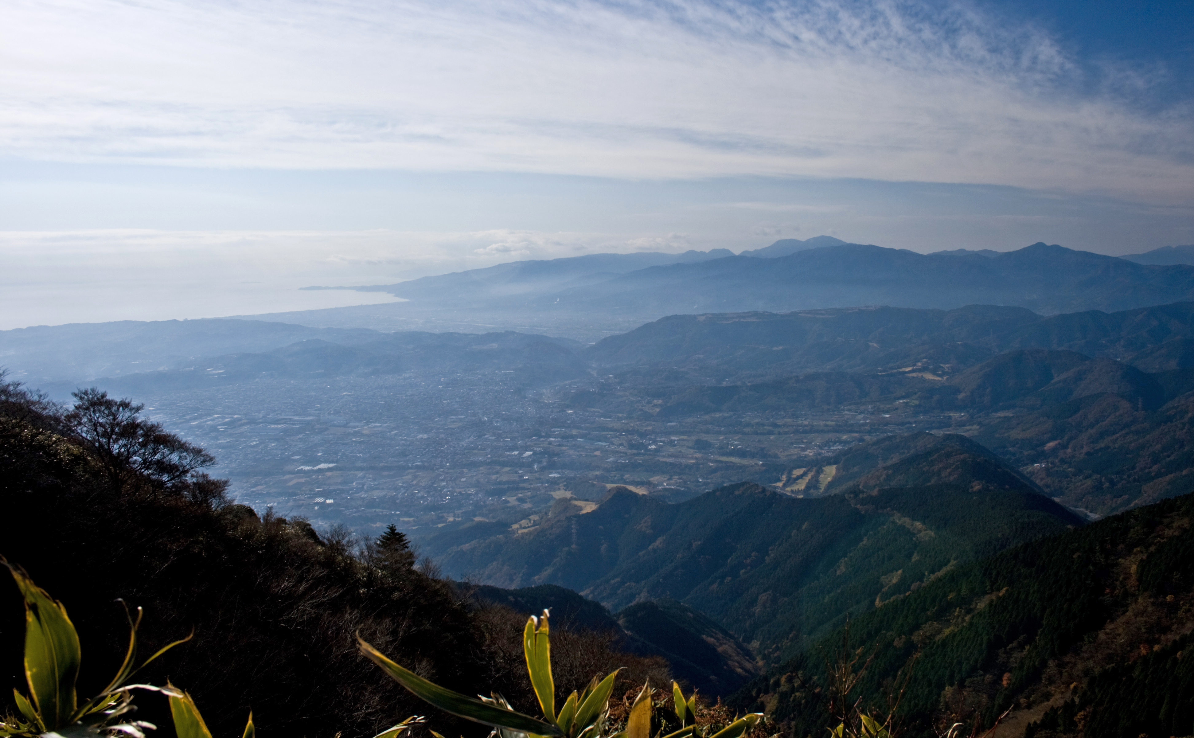 丹沢山地・二ノ塔付近より秦野盆地(手前) と箱根山(奥)